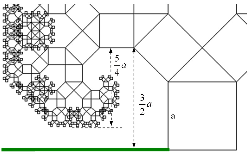 Abstand zum Boden